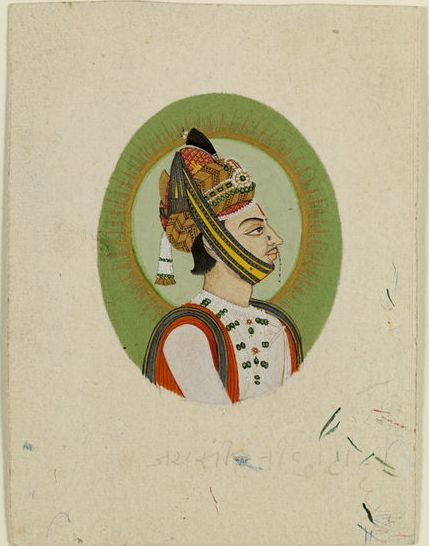 Sawai Jai Singh III